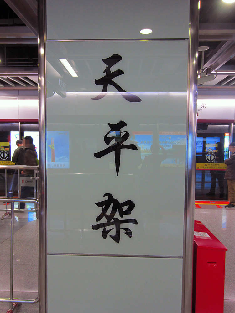 天平架站大字